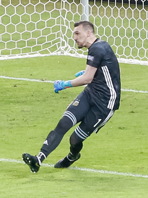 (Belo Horizonte - MG, 02/07/2019) Presidente da República, Jair Bolsonaro durante partida de futebol Brasil e Argentina. Foto: Carolina Antunes/PR